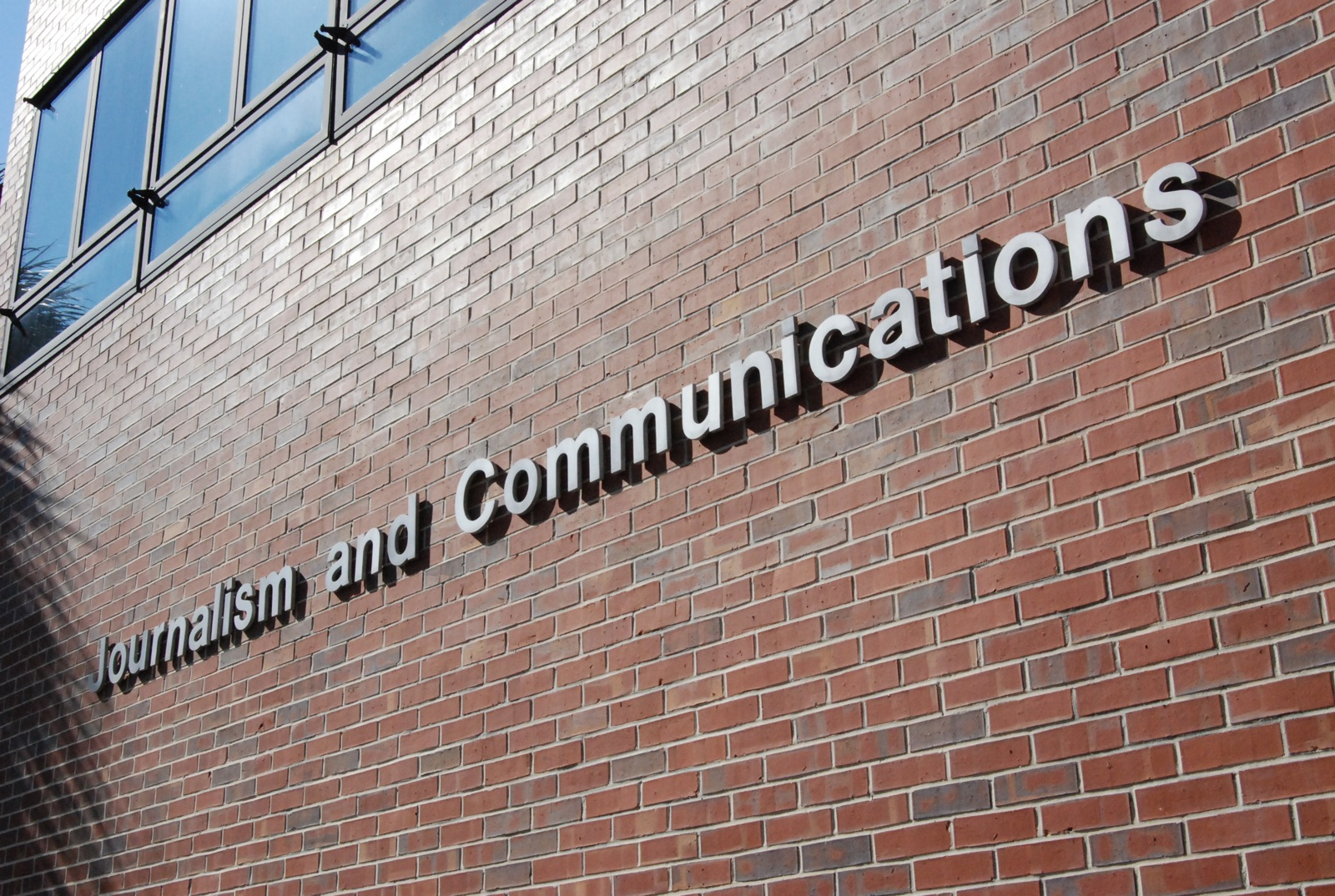 Weimer Hall